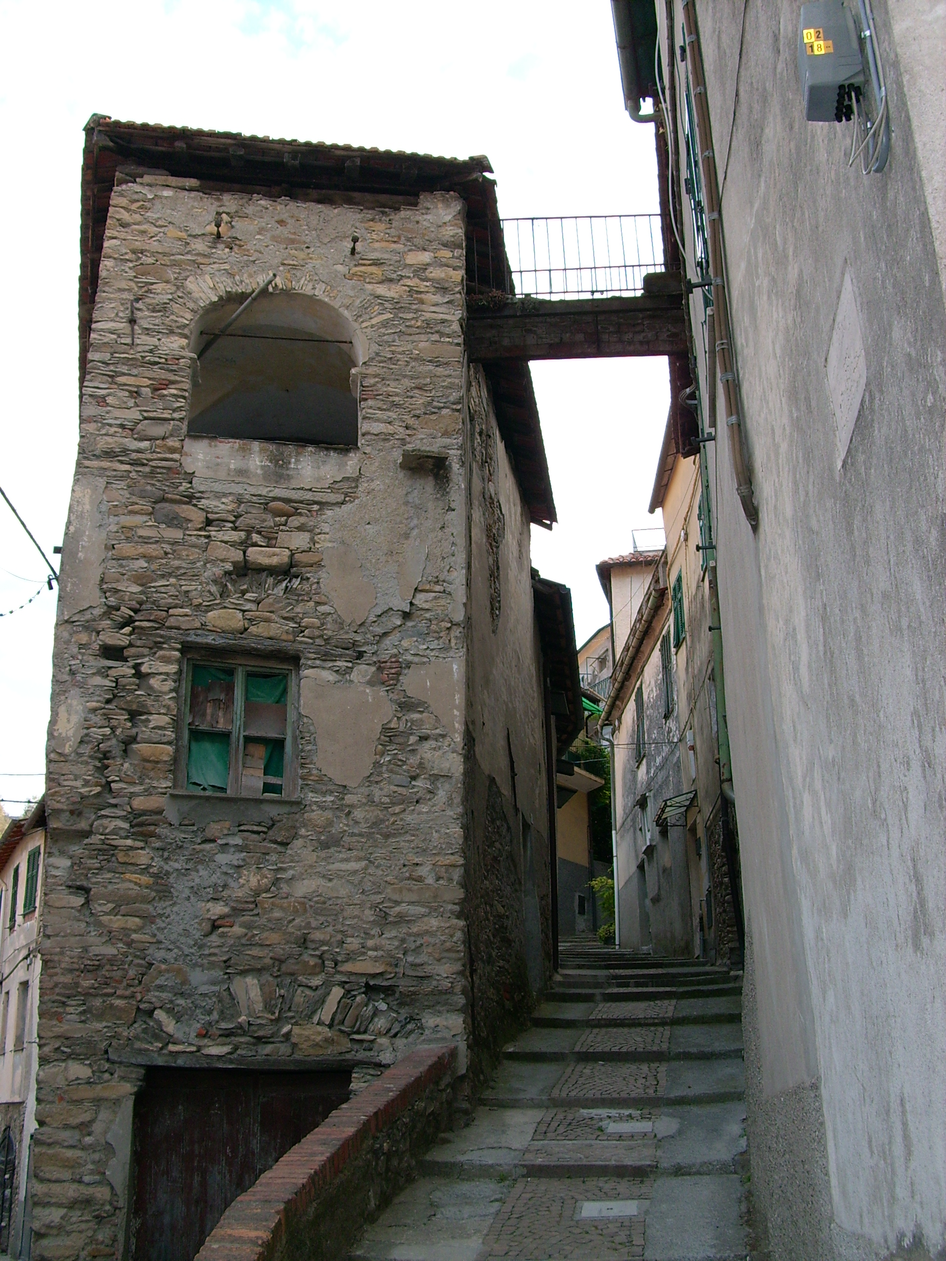 Centro storico di Chiusavecchia, Liguria, Italia